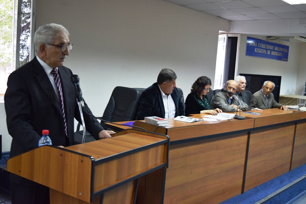 Фото из презентации личной книги